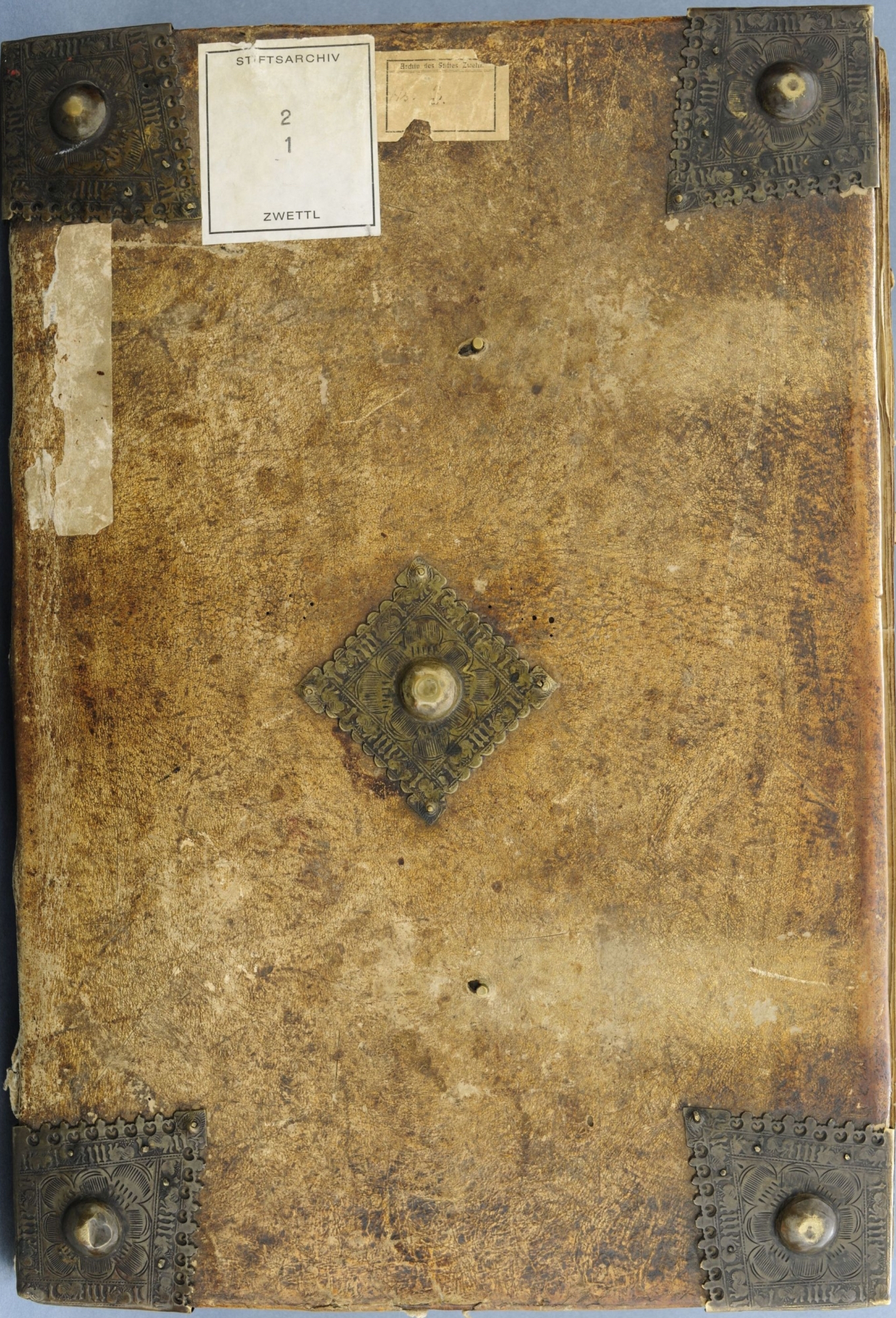 Einband (Vorderdeckel) der Bärenhaut, einer Zwettler Handschrift aus dem frühen 14. Jahrhundert